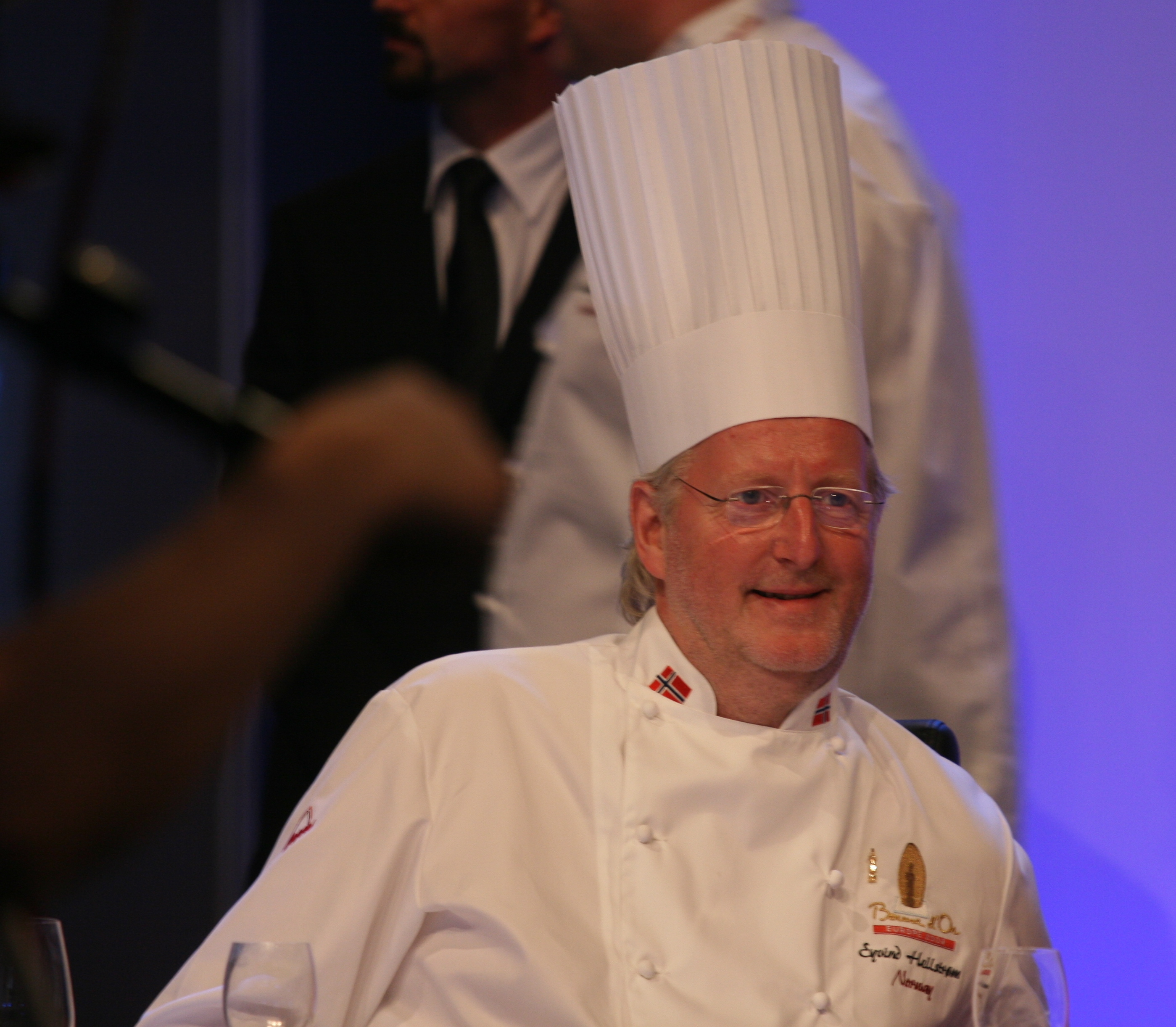 Eyvind Hellstrøm som dommer under Bocuse d’Or 2008 I Stavanger.